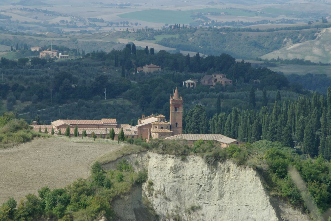 Monte Oliveto Maggiore, Siena, Toscana, ItaliaMonte Oliveto Maggiore